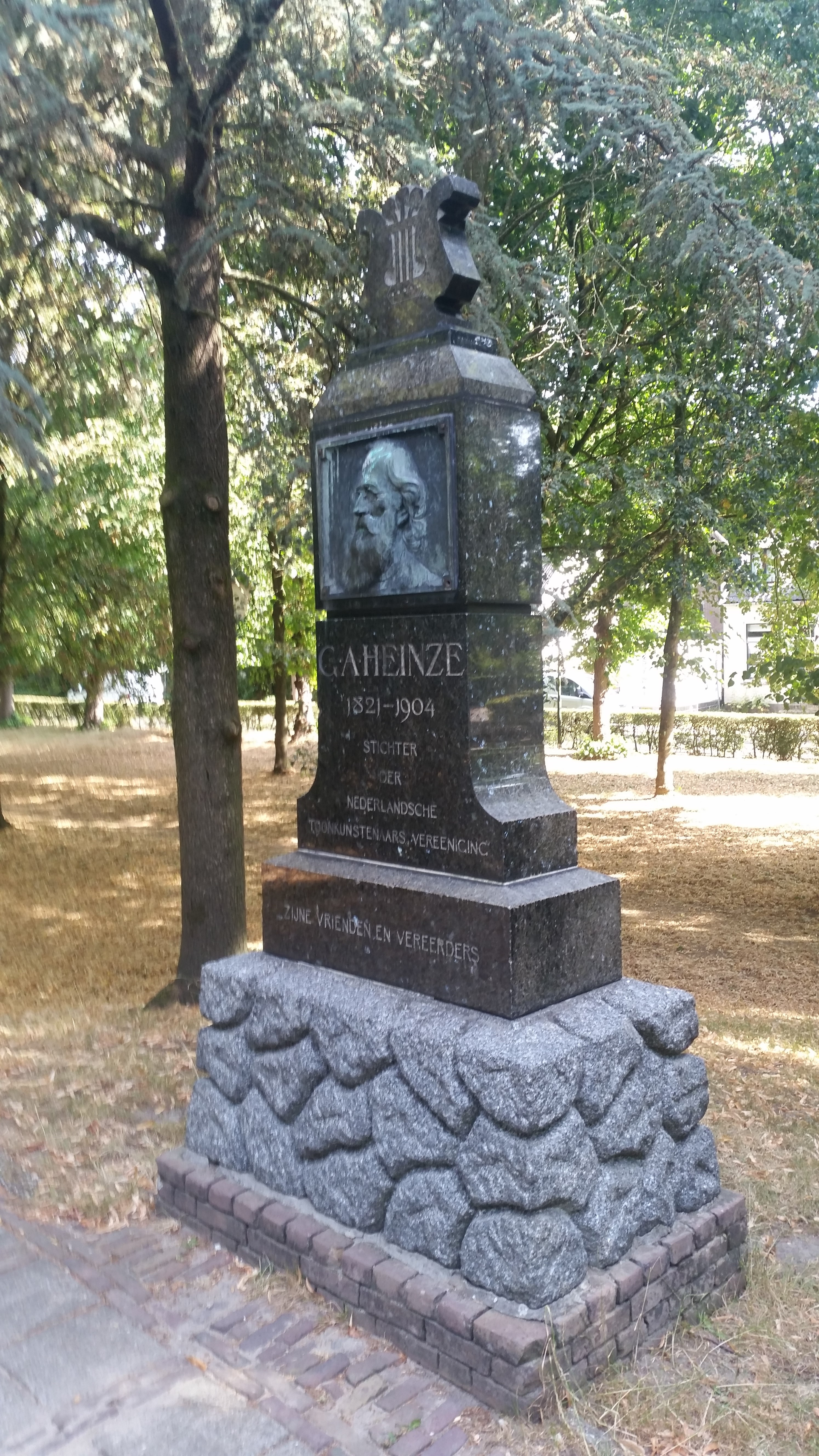 Monument Gustaaf Adolf Heinze, midden op Brink, Muiderberg